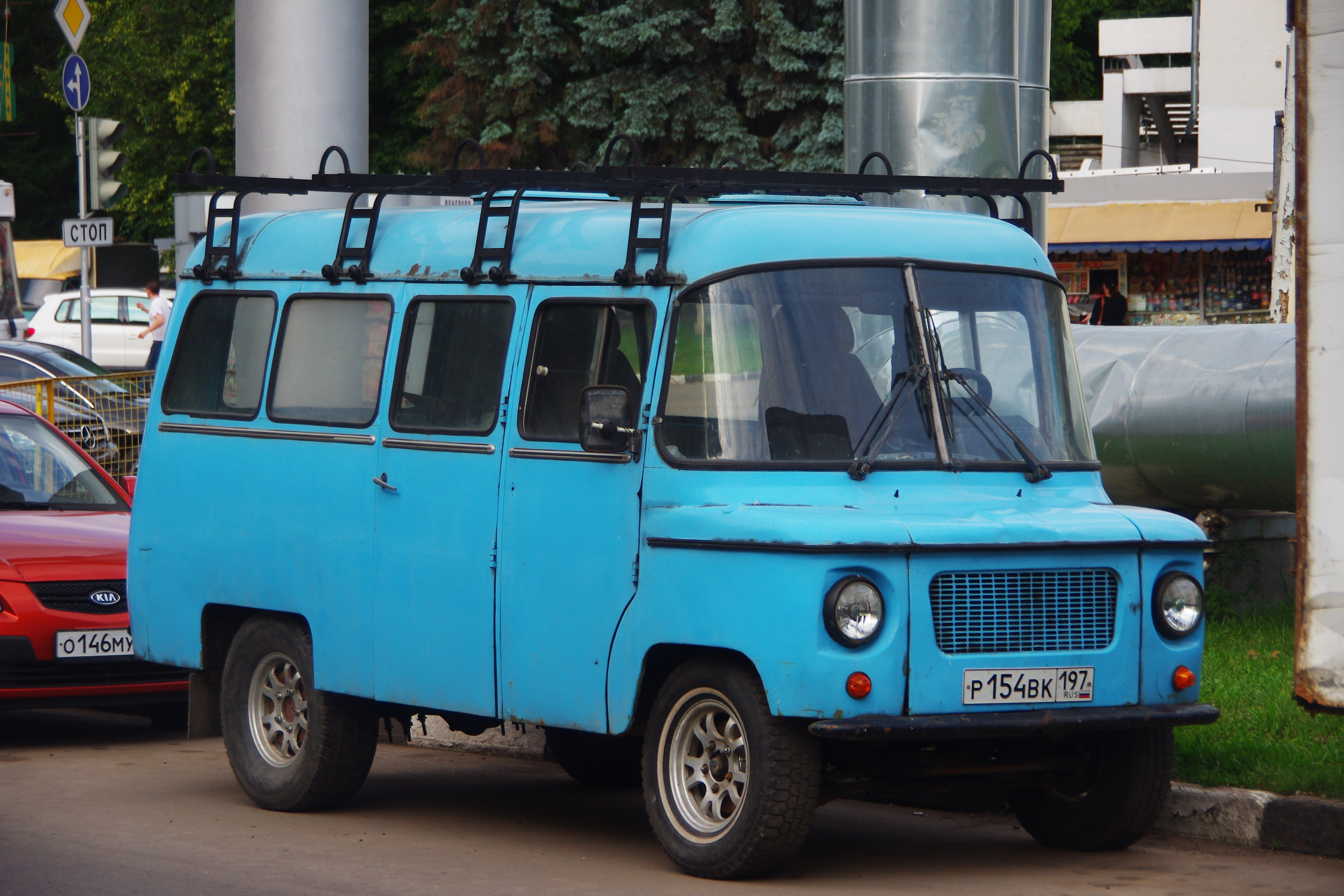 Moscow NYSA van at_nysa_20120625_032